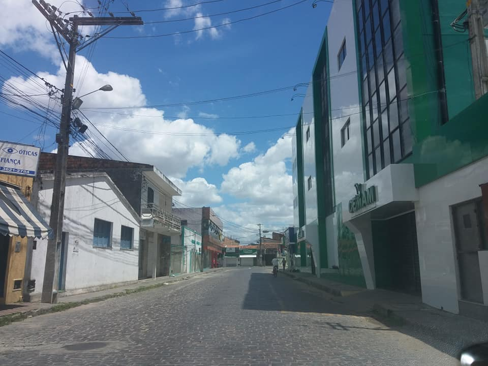 CEMAM - Colégio Particular de Cruz das Almas